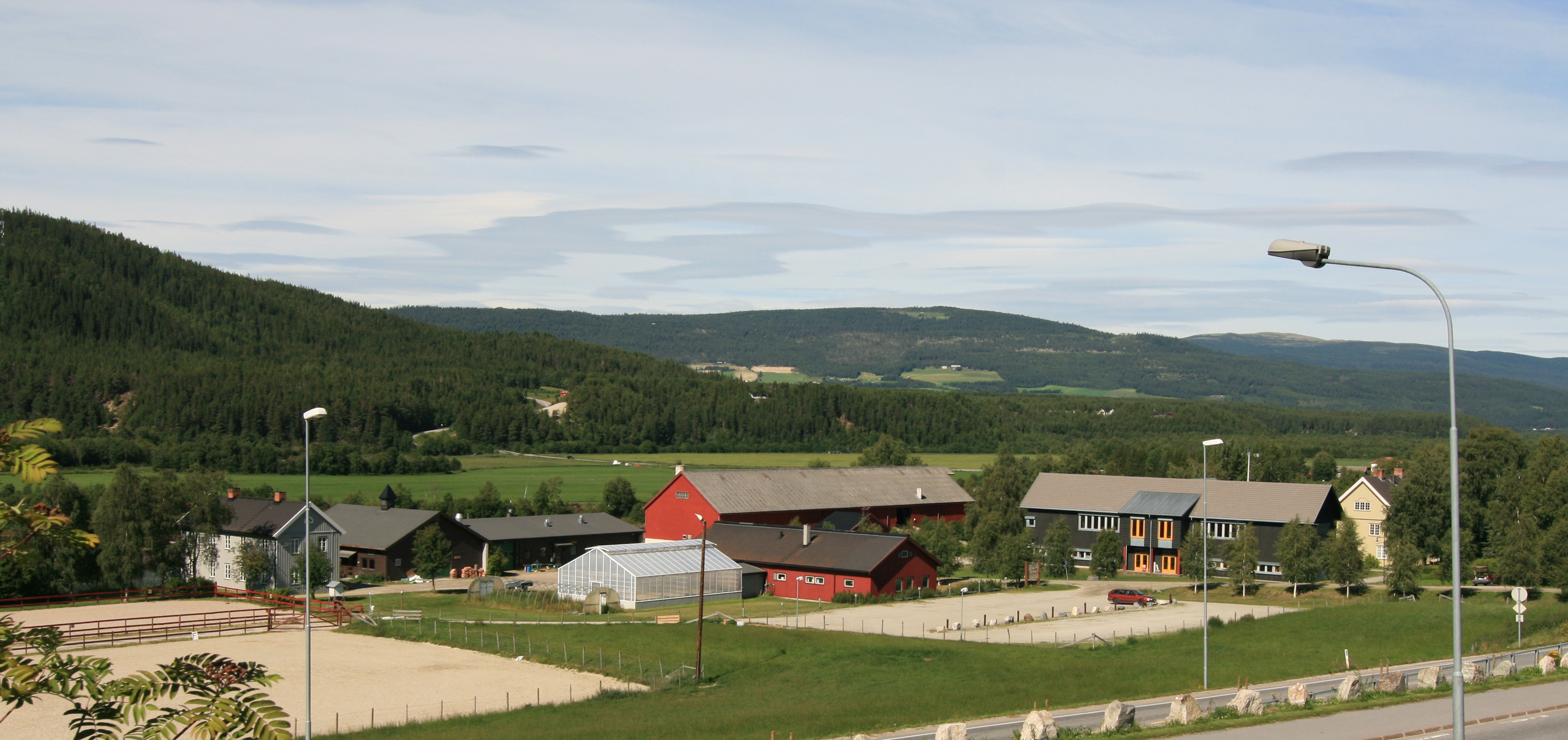 Storsteigen landbruksskole (Nord-Østerdal videregående skole), Alvdal.